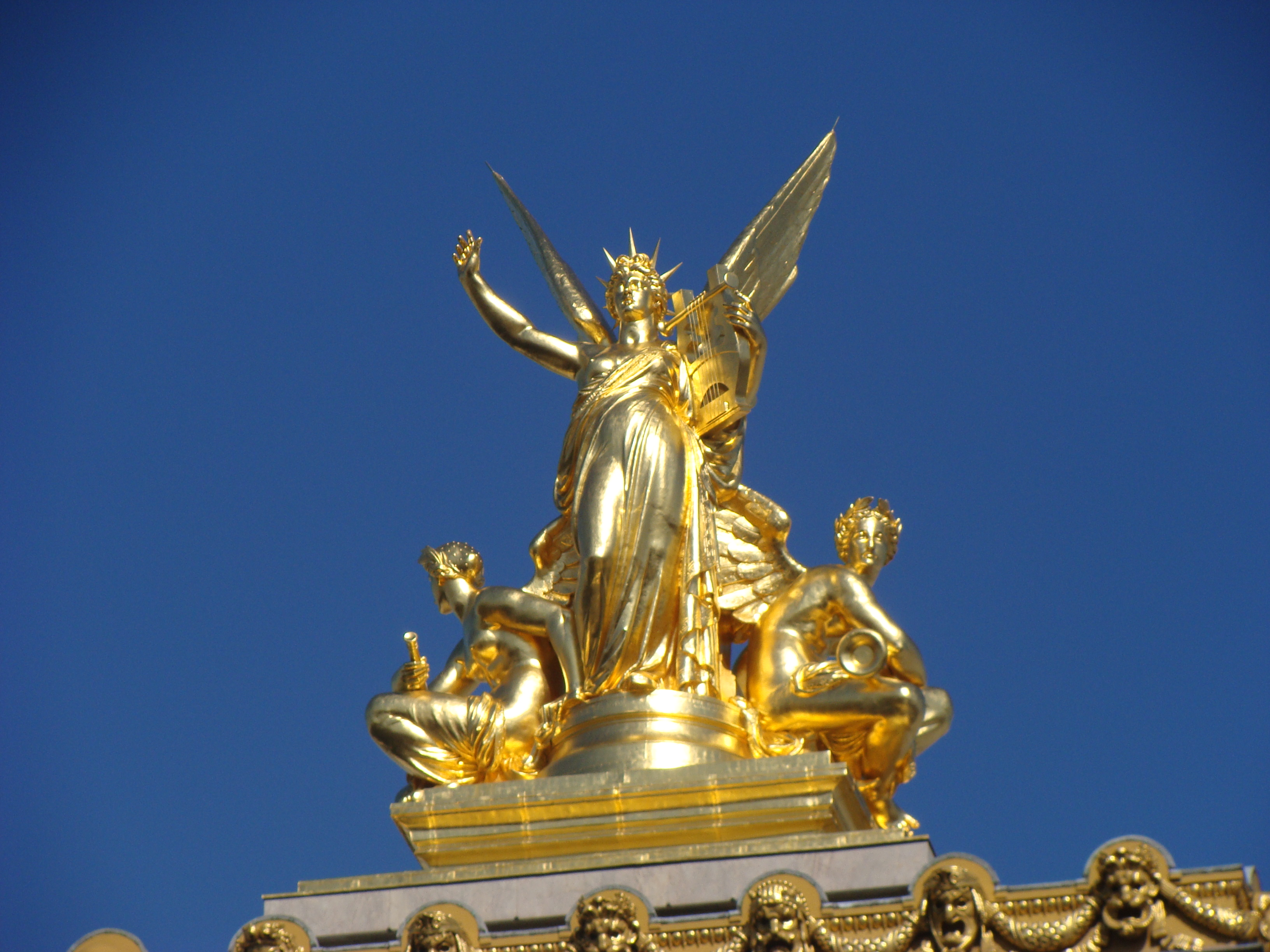 "Η Ποίηση". Έργο του Σαρλ Αλφόνς Γκυμερύ (1827 - 1871). Παρίσι, Όπερα Γκαρνιέ.